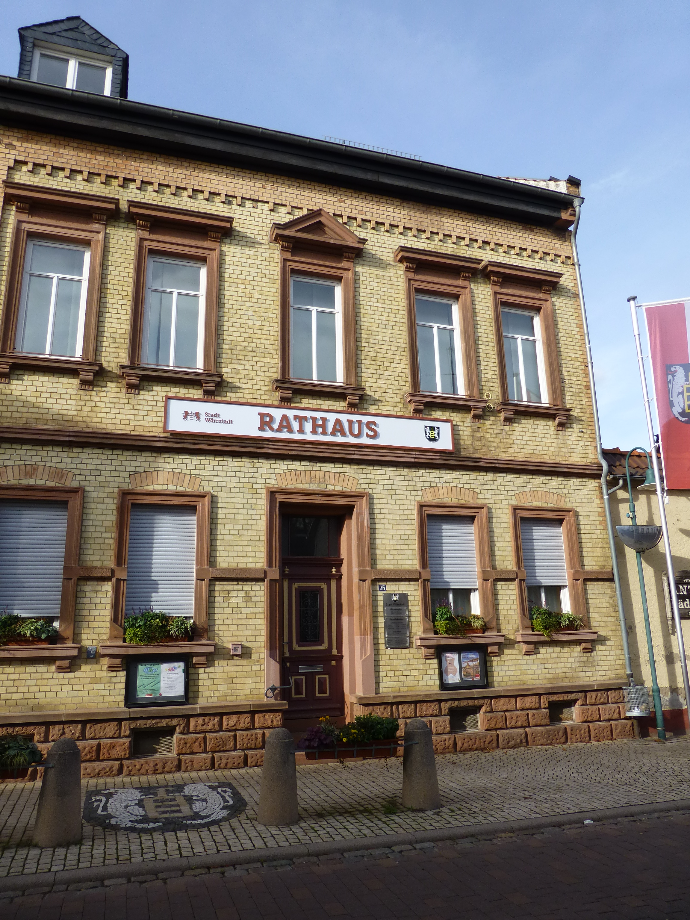 Wörrstadt Rathaus, Pariser Strasse 75.